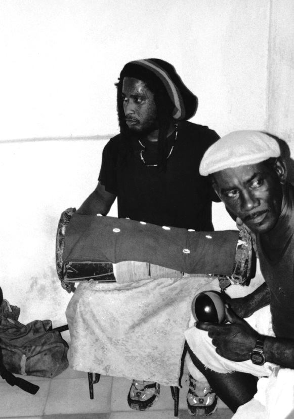 Rastafari